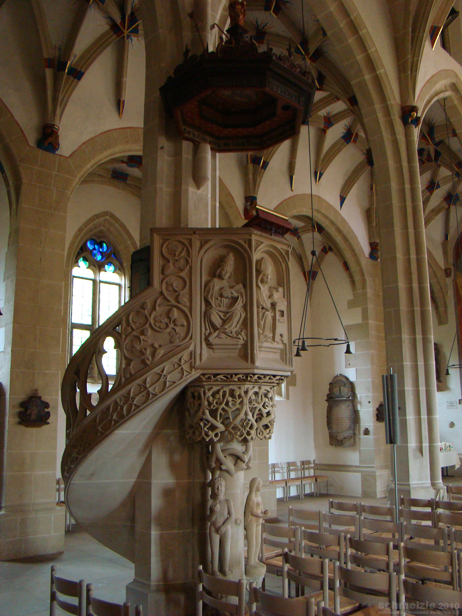 Kanzel der Alexanderkirche in Marbach am Neckar